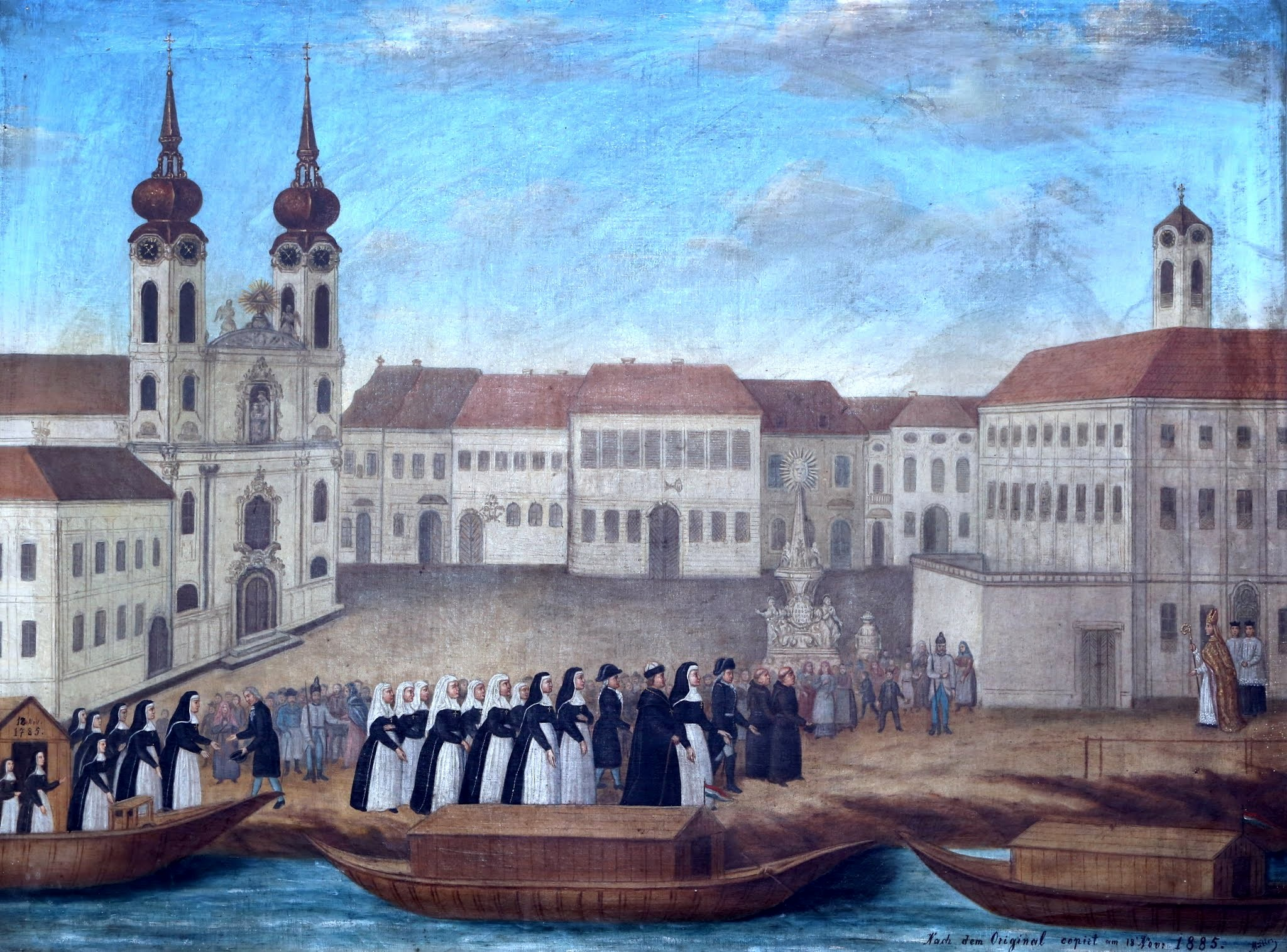 Az első Erzsébet apácák megérkezése Budára / eredeti festmény után készült másolat, 1885 (Budapest-felsővízivárosi Szent Anna plébánia, Thaler Tamás felvétele)